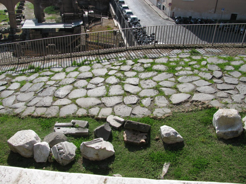 Clivus capitolinus, section